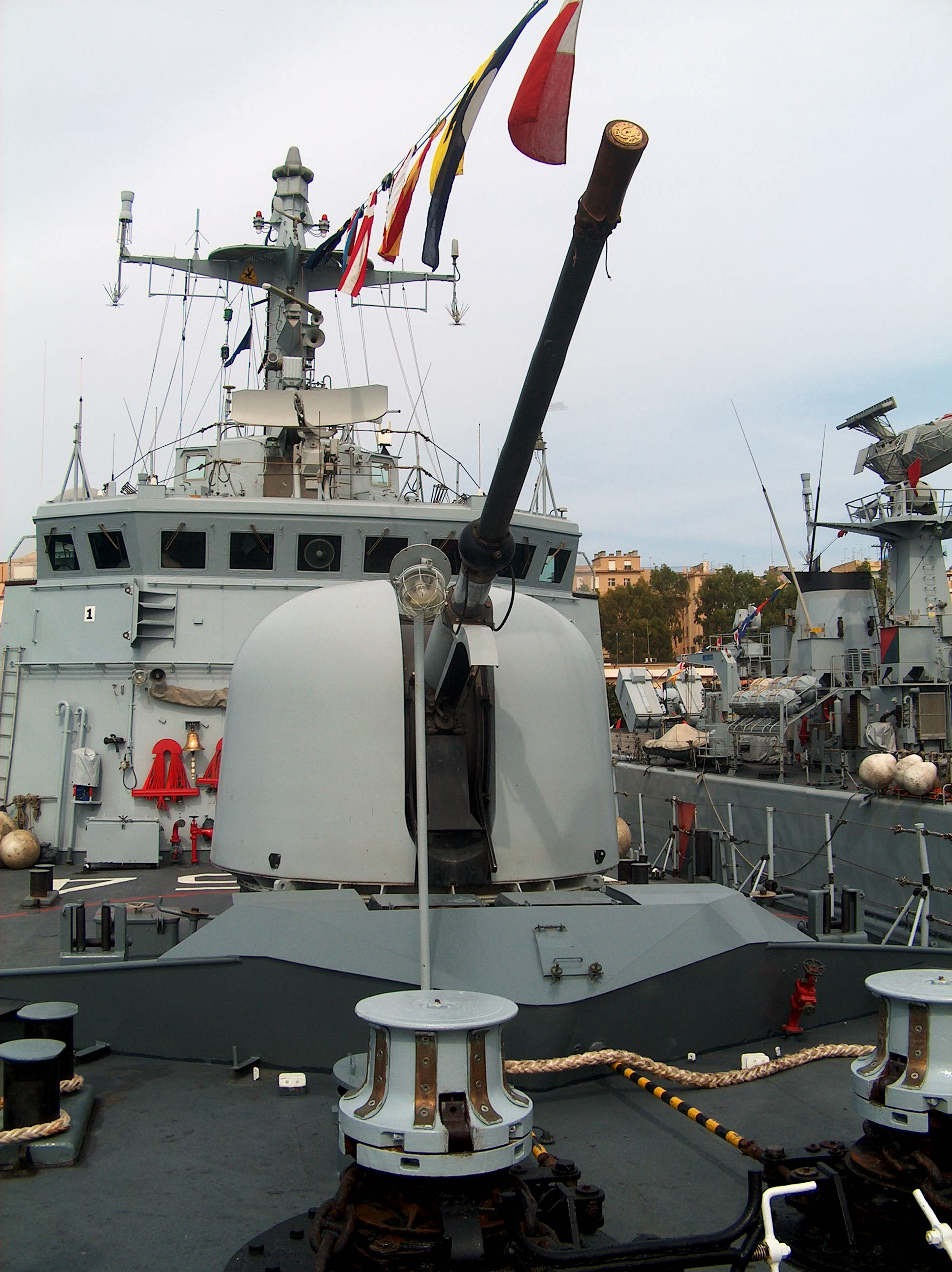 Cannone da 76/62 su una corvetta della classe Minerva della MMI